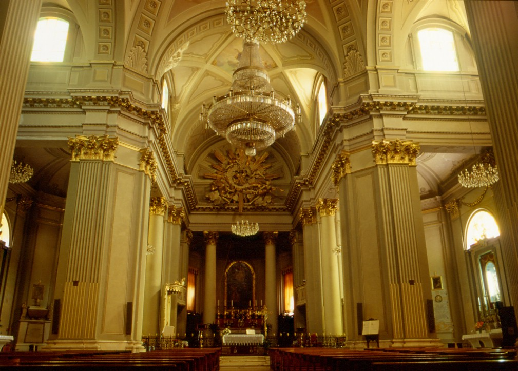 Presbiterio della Cattedrale di Treia, progettata dall'Arch. Andrea Vici